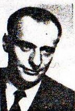 Václav Lemberg, ředitel Gymnázia v Kadani v letech 1955 až 1965